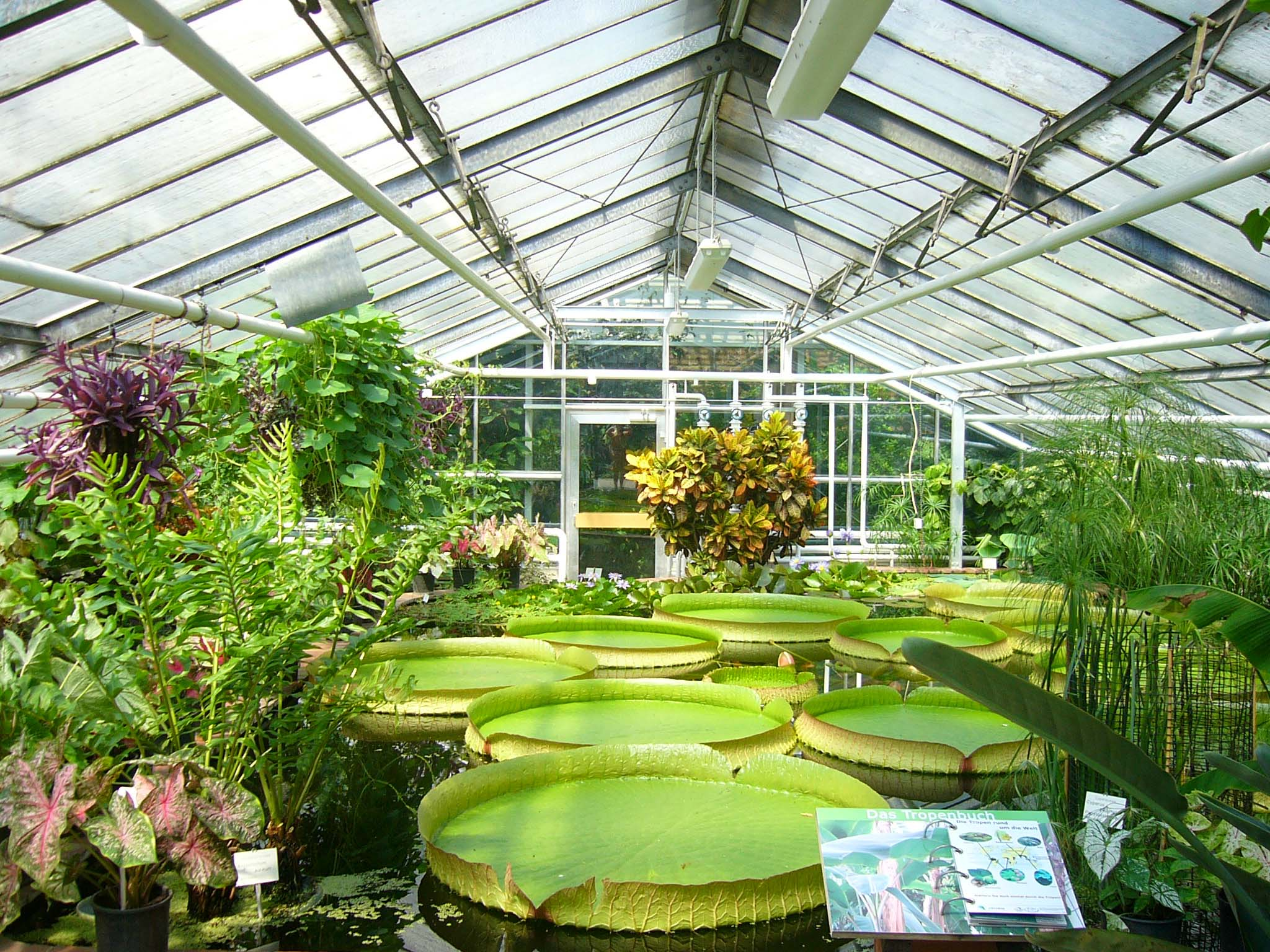 Victoria in the botanical Garden of Braunschweig (Botanischer Garten der Technischen Universität Braunschweig)